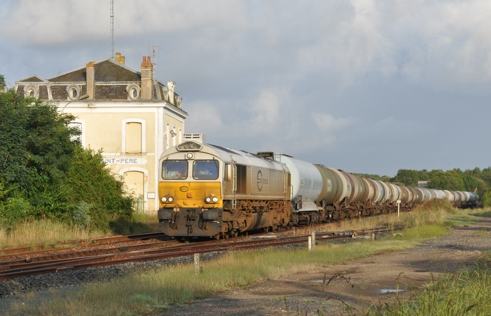 Un train ECR Donges Poitiers passe le Champ St Père le 11 août 2014